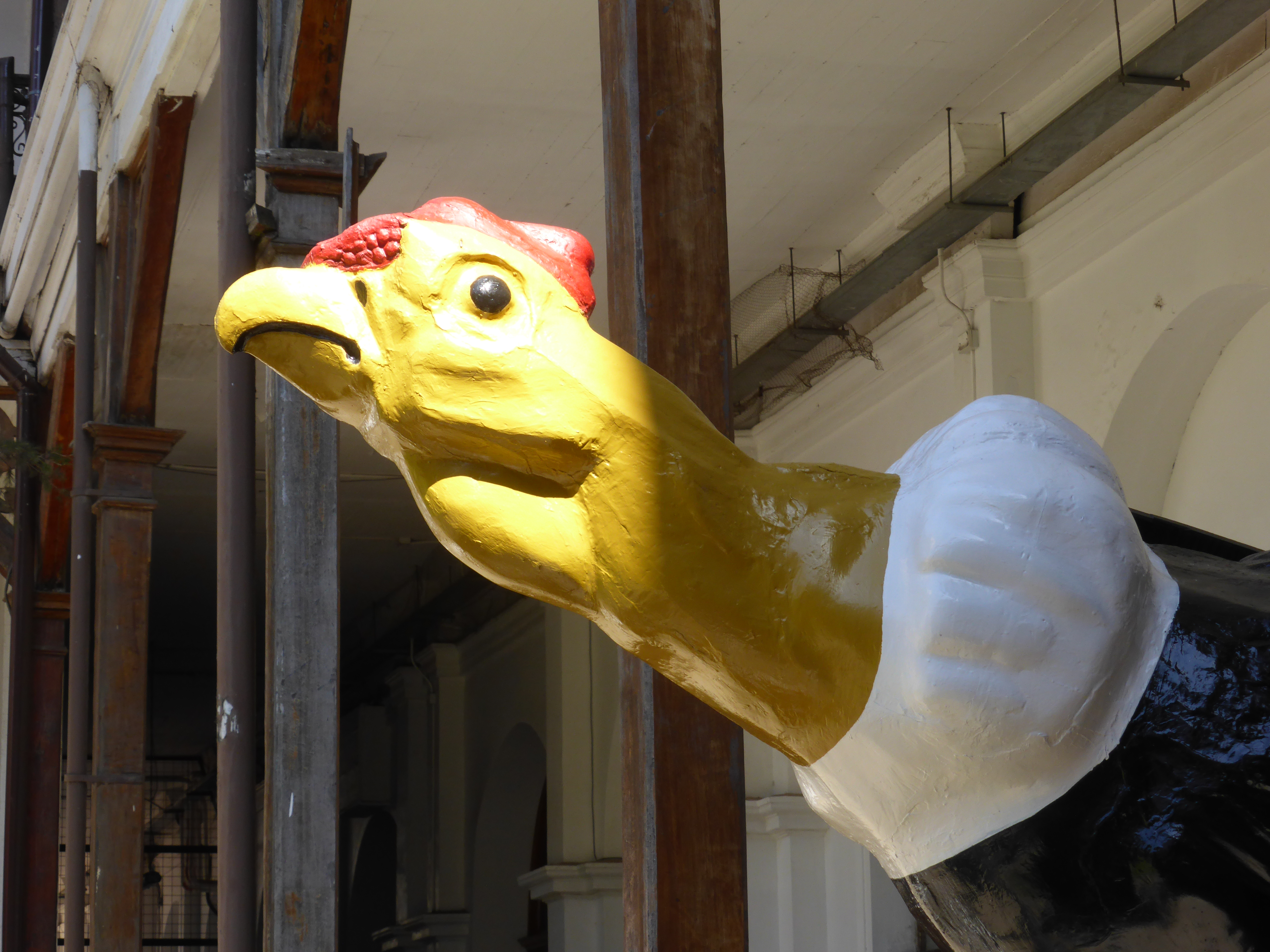 Este inicial mascarón de proa fue montado en el año 1954 en el buque escuela Esmeralda. Desmontado en 1991 y restaurado en 2006. Actualmente en el patio del Museo Marítimo Nacional (Valparaíso, Chile).